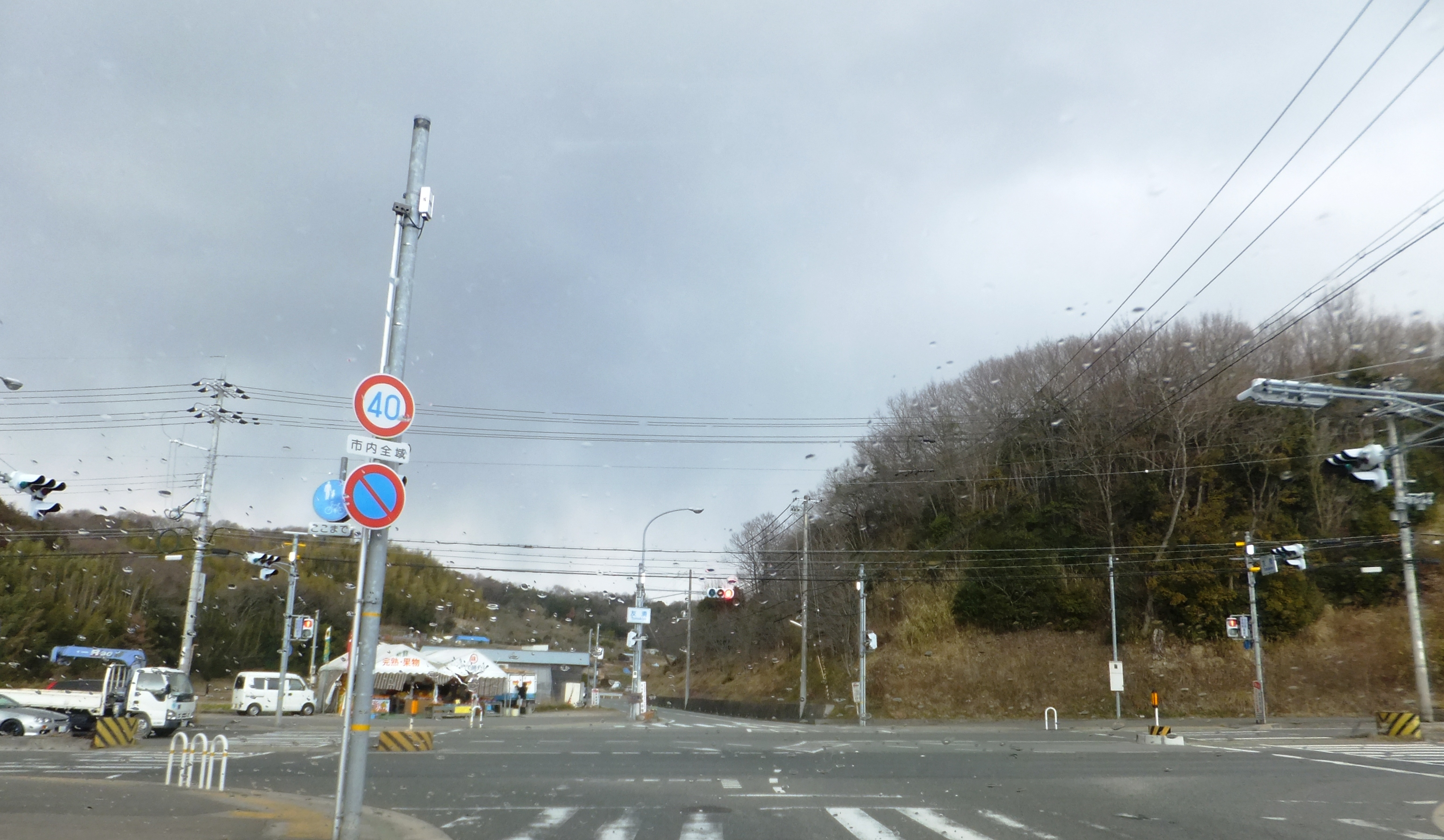 兵庫県神戸市西区櫨谷町友清